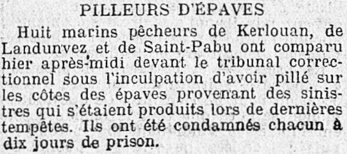 Extrait du journal L'Univers du 13 mars 1910 condamnant des pilleurs d'épaves de Kerlouan, Landunvez et Saint-Pabu.